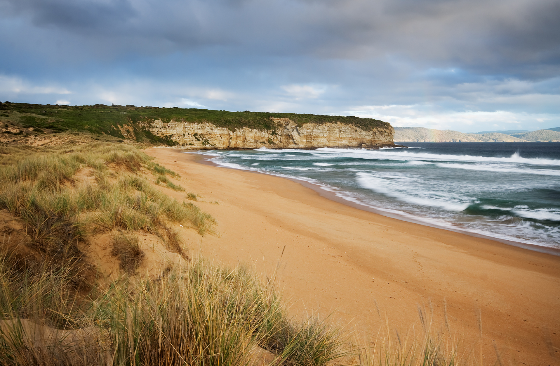 1.2 only